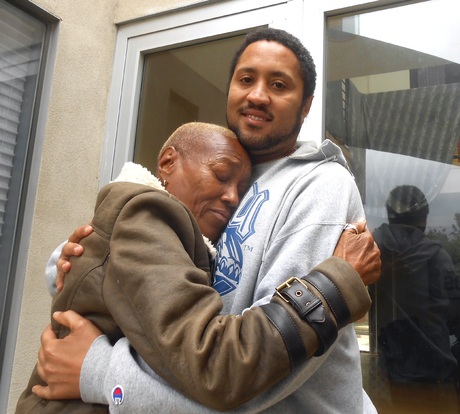 Gloria Jones mit ihrem Sohn Rolan Bolan, vor seinem Haus in Hollywood, Los Angeles 2014